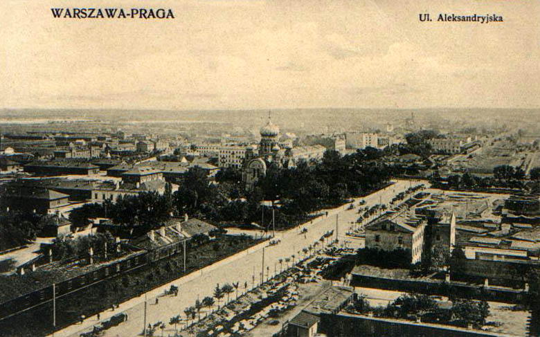 Sobór św. Marii Magdaleny w Warszawie